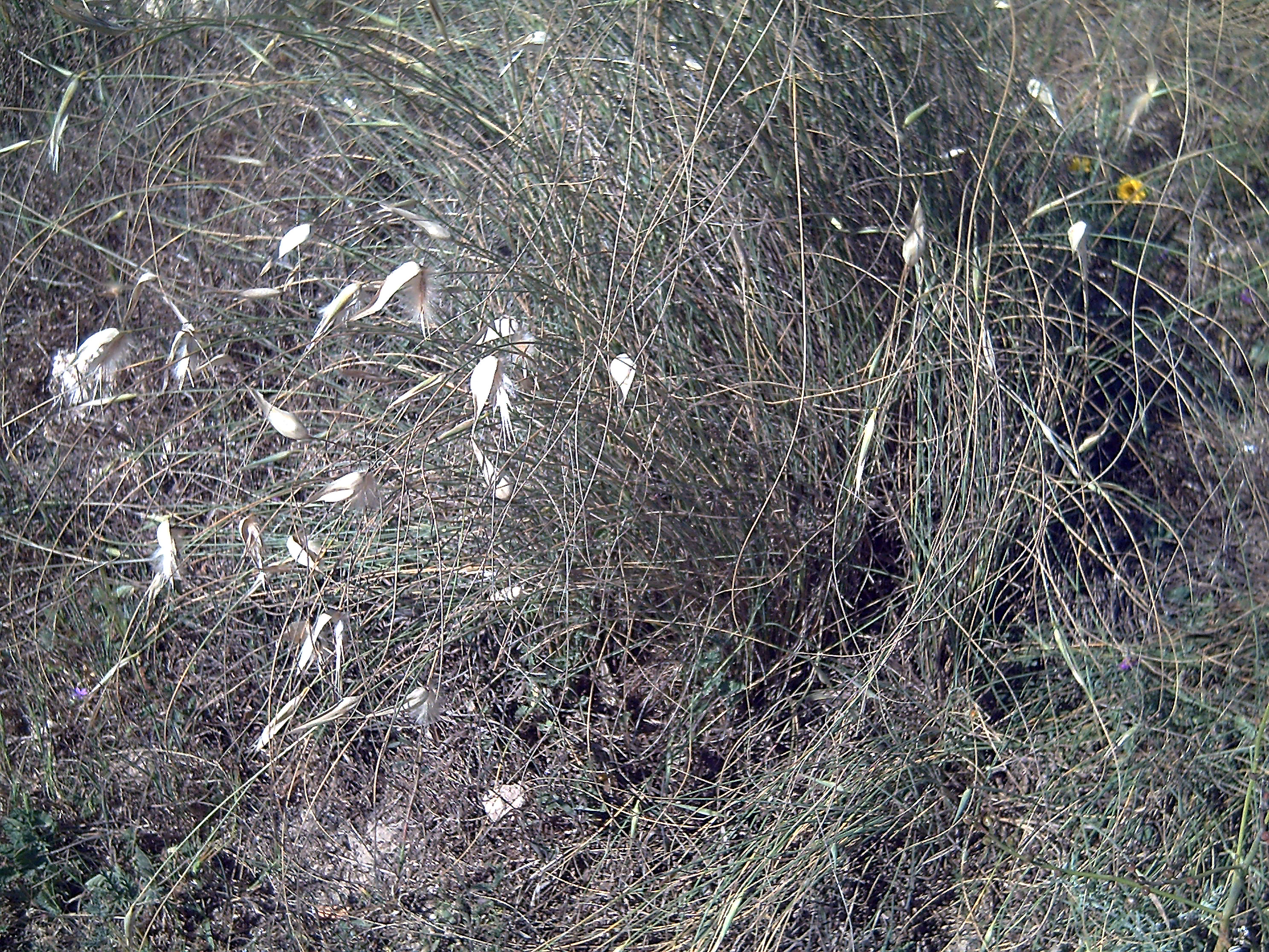 Lygeum_spartum en La Mata, Torrevieja, Alicante, Spain